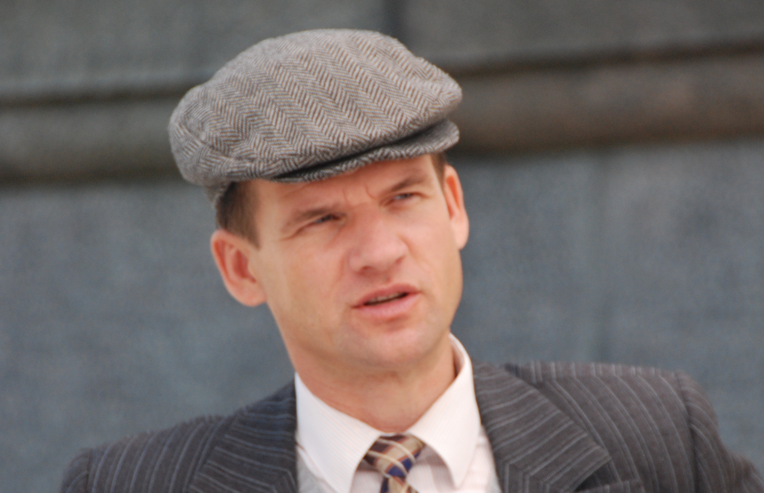 Filmas "Sapņu komanda 1935" epizodes filmēšana pie Ministru kabineta ēkas